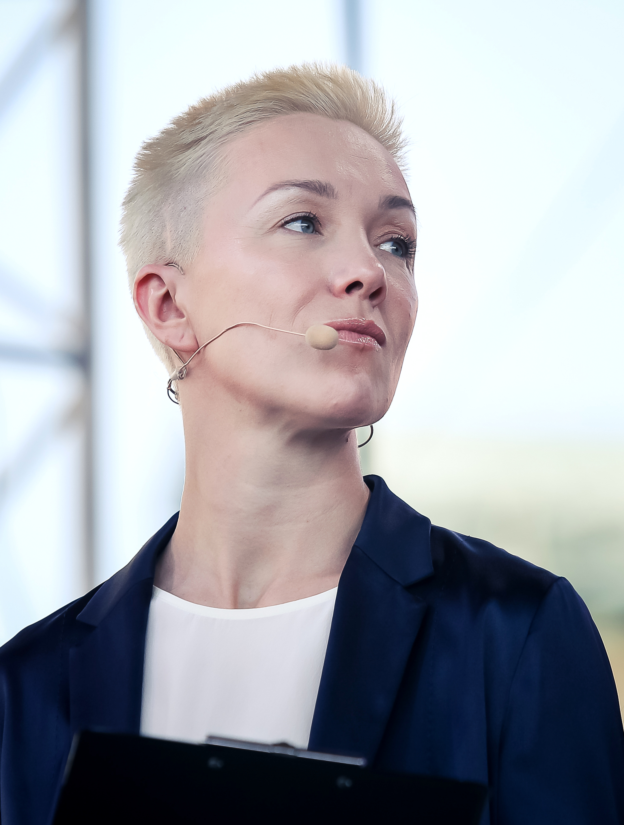 Актриса Дарья Мороз на книжном фестивале «Красная площадь». Церемония награждения литературной премии «Лицей».